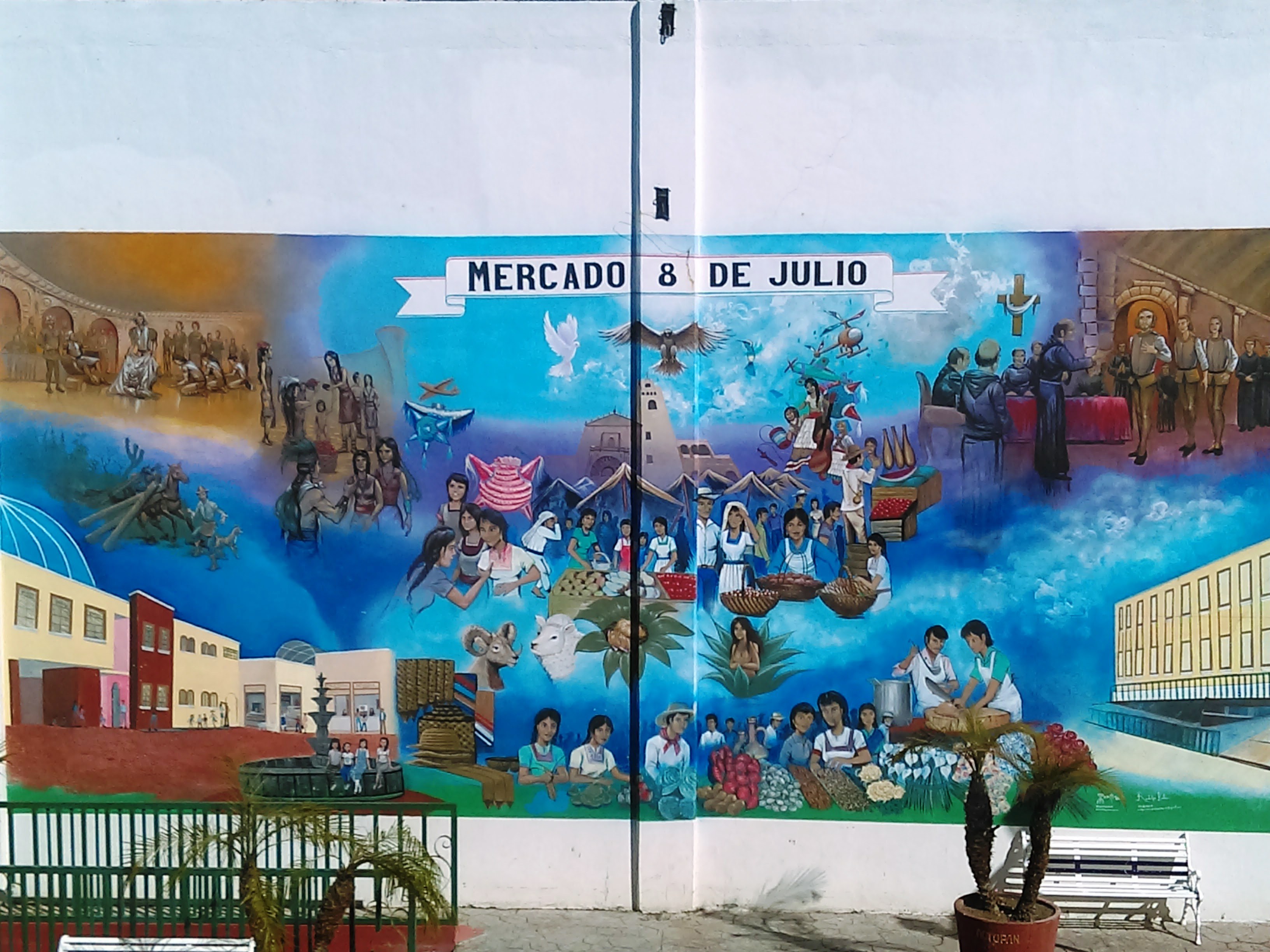 Mercado 8 de julio en Actopan, Hidalgo, México.